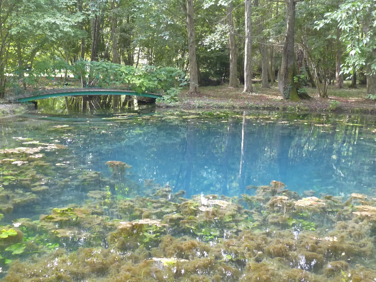 "Fontaine aux fées" — Fontaines Bleues, château de Beaulon, St-Dizant-du-Gua, Charente-Maritime, France.